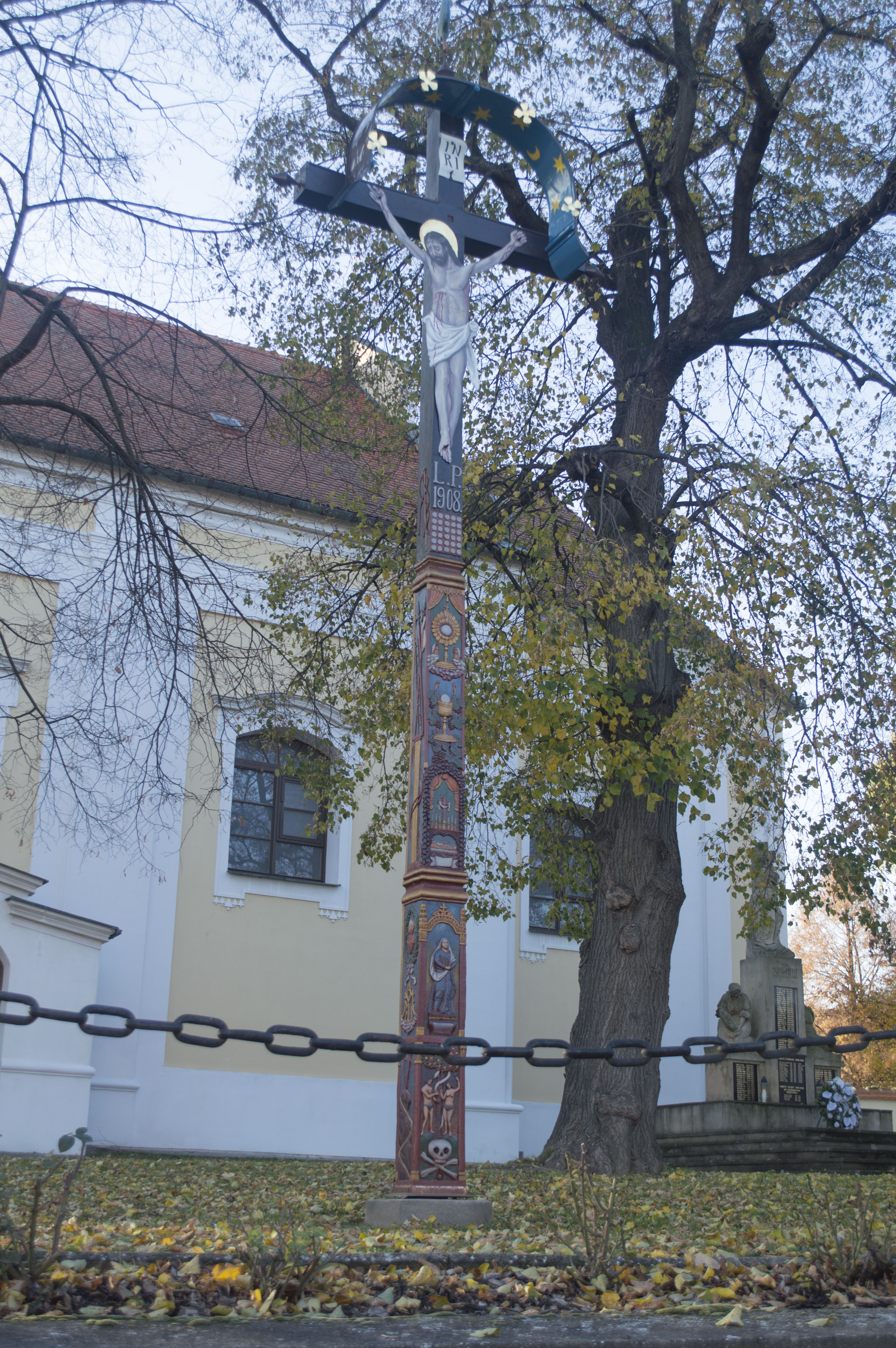 Dolní Bojanovice, dřevěný kříž u kostela od Františka Výmyslického.